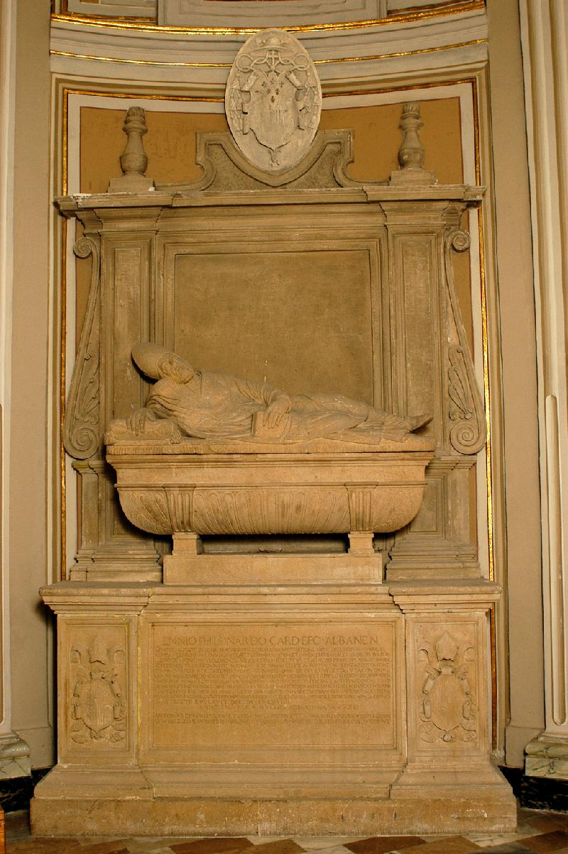 Tipologia monumento sepolcrale Misure cm 500.0x260.0 (HxL) Datazione secolo XVI (1549) Autore maestranze laziali Materia e tecnica pietra scolpita, incisa Soggetto Ritratto del cardinale Ennio Filonardi